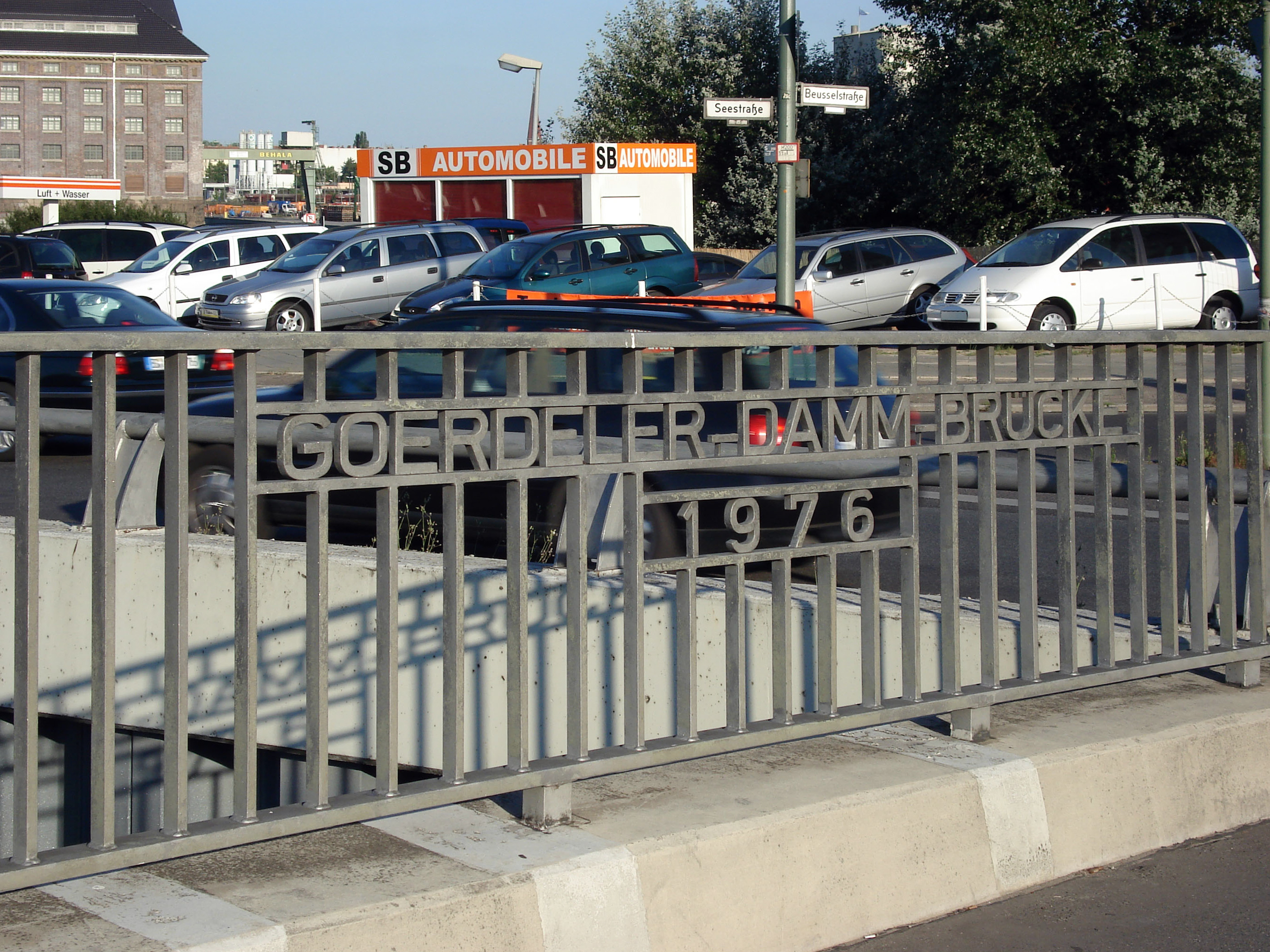 Goerdeler-Damm-Brücke over the BAB100